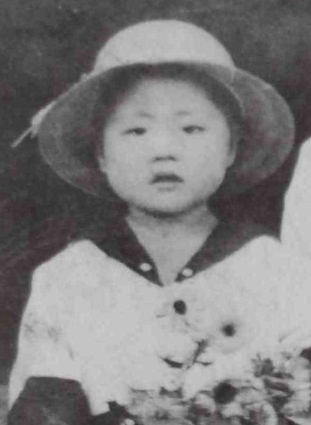 李姬镐幼年